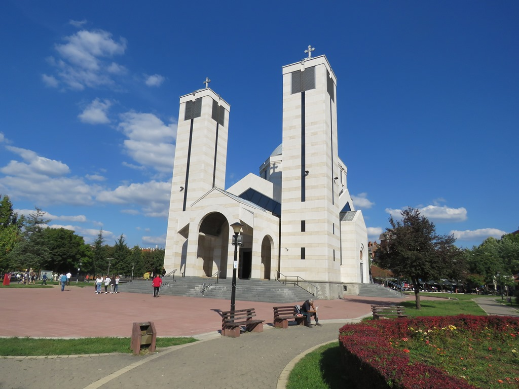 Srpski (latinica): Park Svetog Save, Niš, Srbija